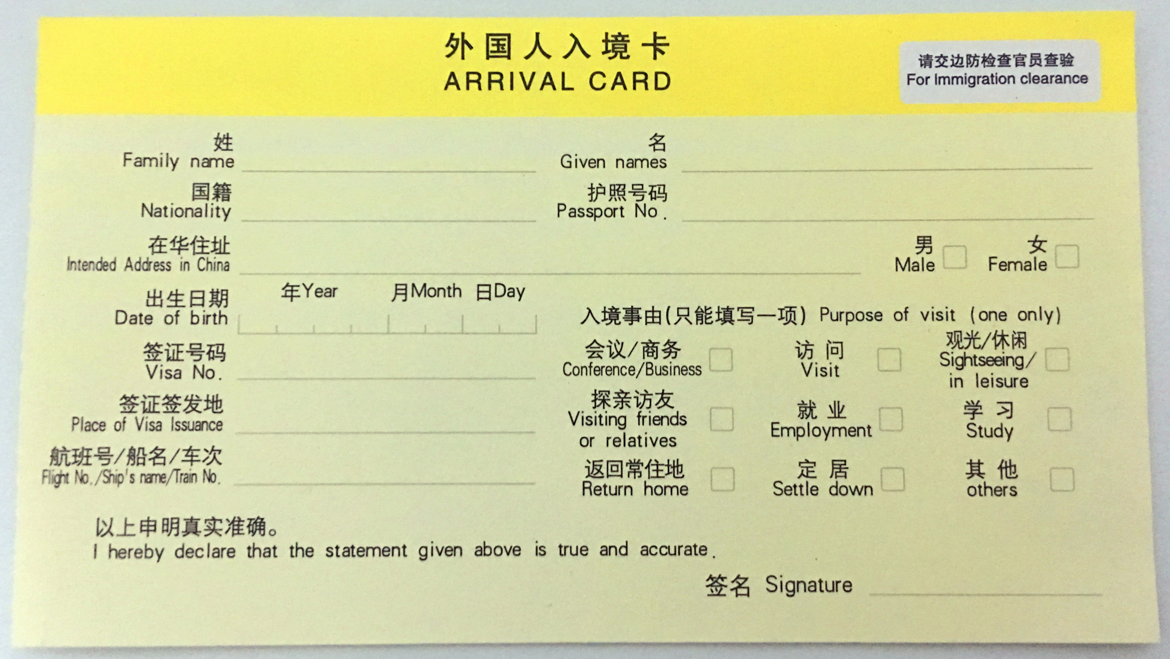 中国外国人入境卡